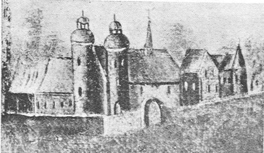 Kloster Fürstenberg, Teilansicht vom Gemälde der Viktortracht aus dem Jahre 1464